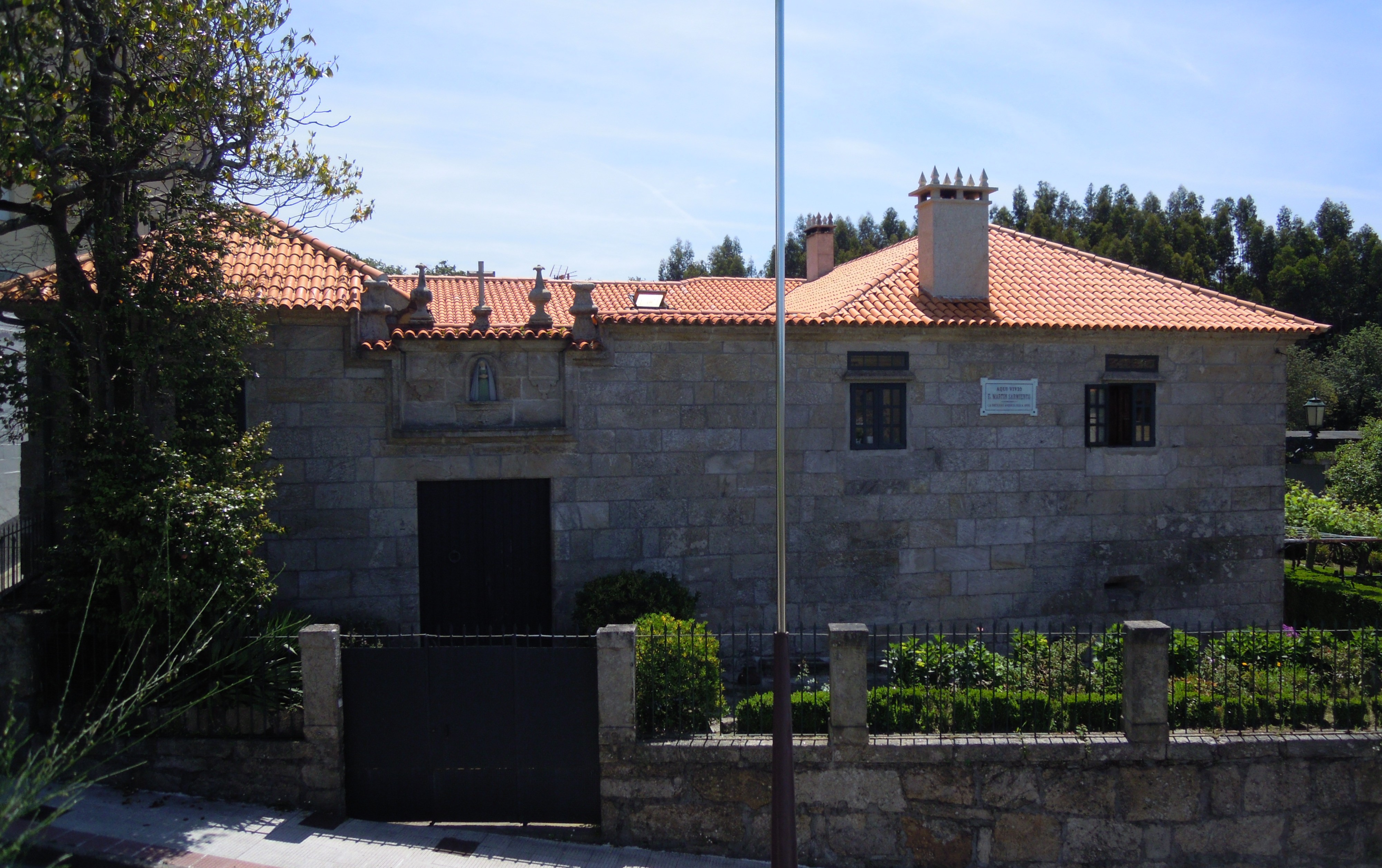 Pazo de Santa Margarida (Mourente, Pontevedra).